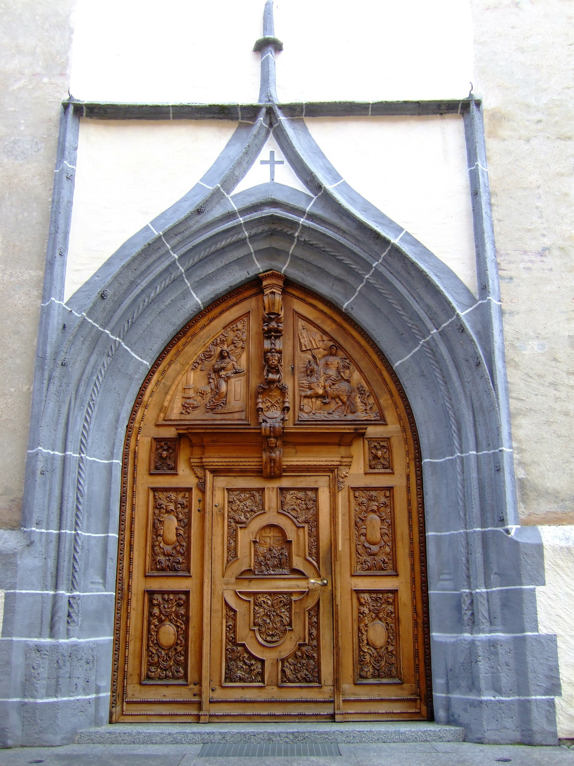 Haupteingang der katholischen Kirche San Vittore in Poschiavo, Schweiz